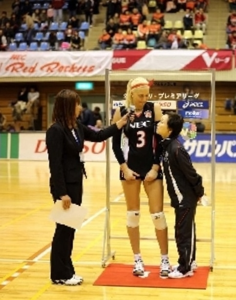 Yeliz Başa